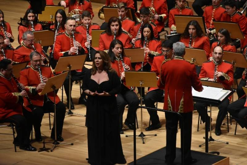 Συναυλία Μέγαρο Μουσικής Αθηνών 2019